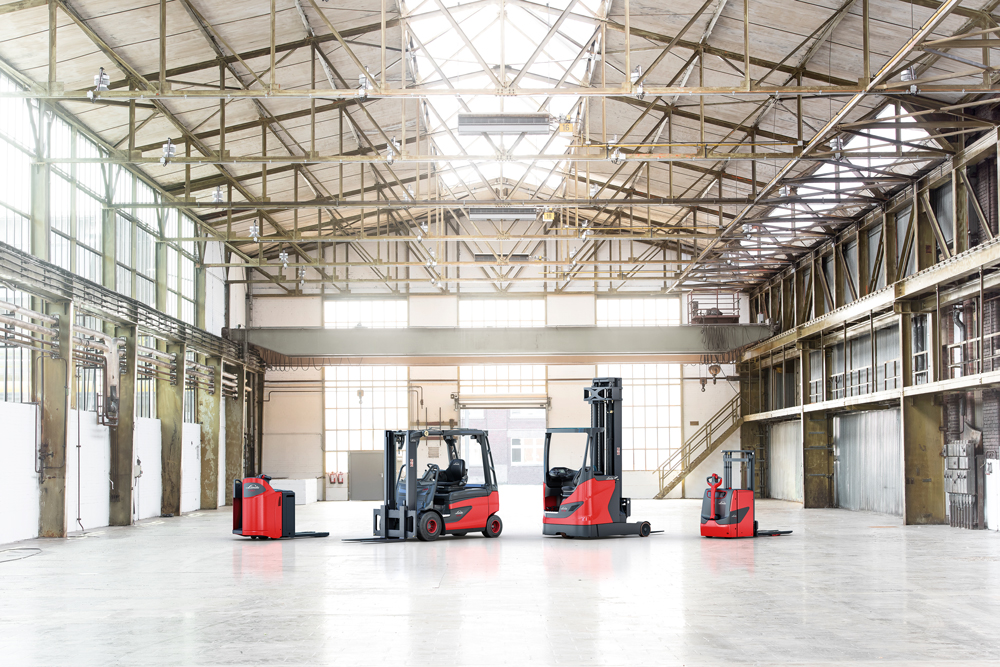 Linde Geräte in Halle